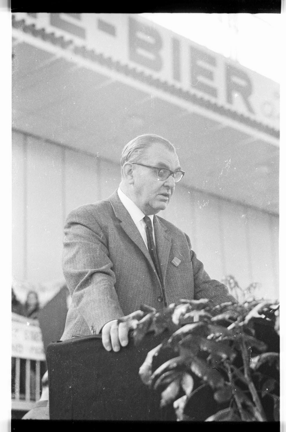 Am Redepult der stellvertretende Bundesvorsitzende des Deutschen Gewerkschaftsbundes (DGB), Hermann Beermann.